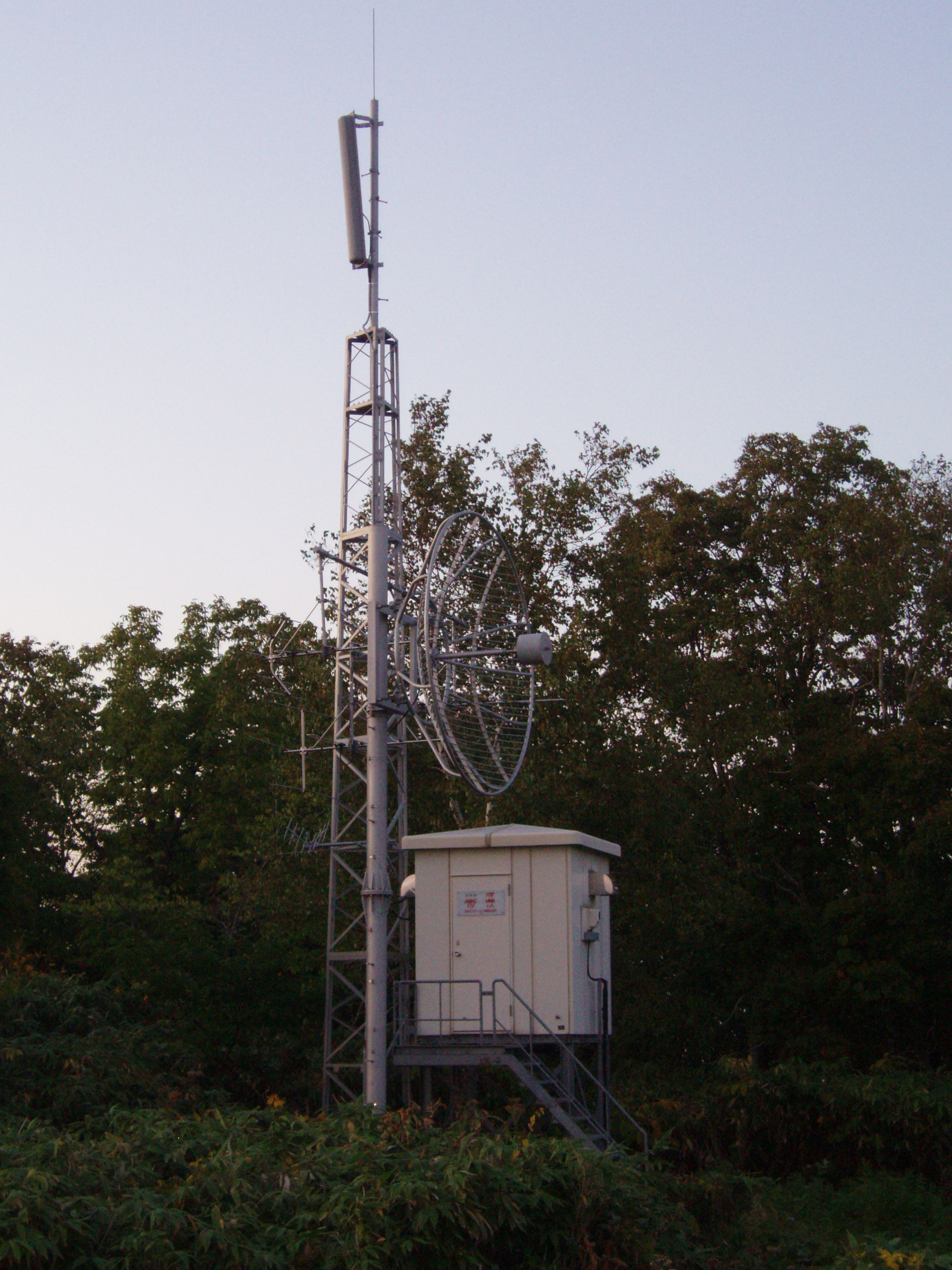 赤井川中継局 NHK・HBC・STV・HTB・UHB・TVh送信設備